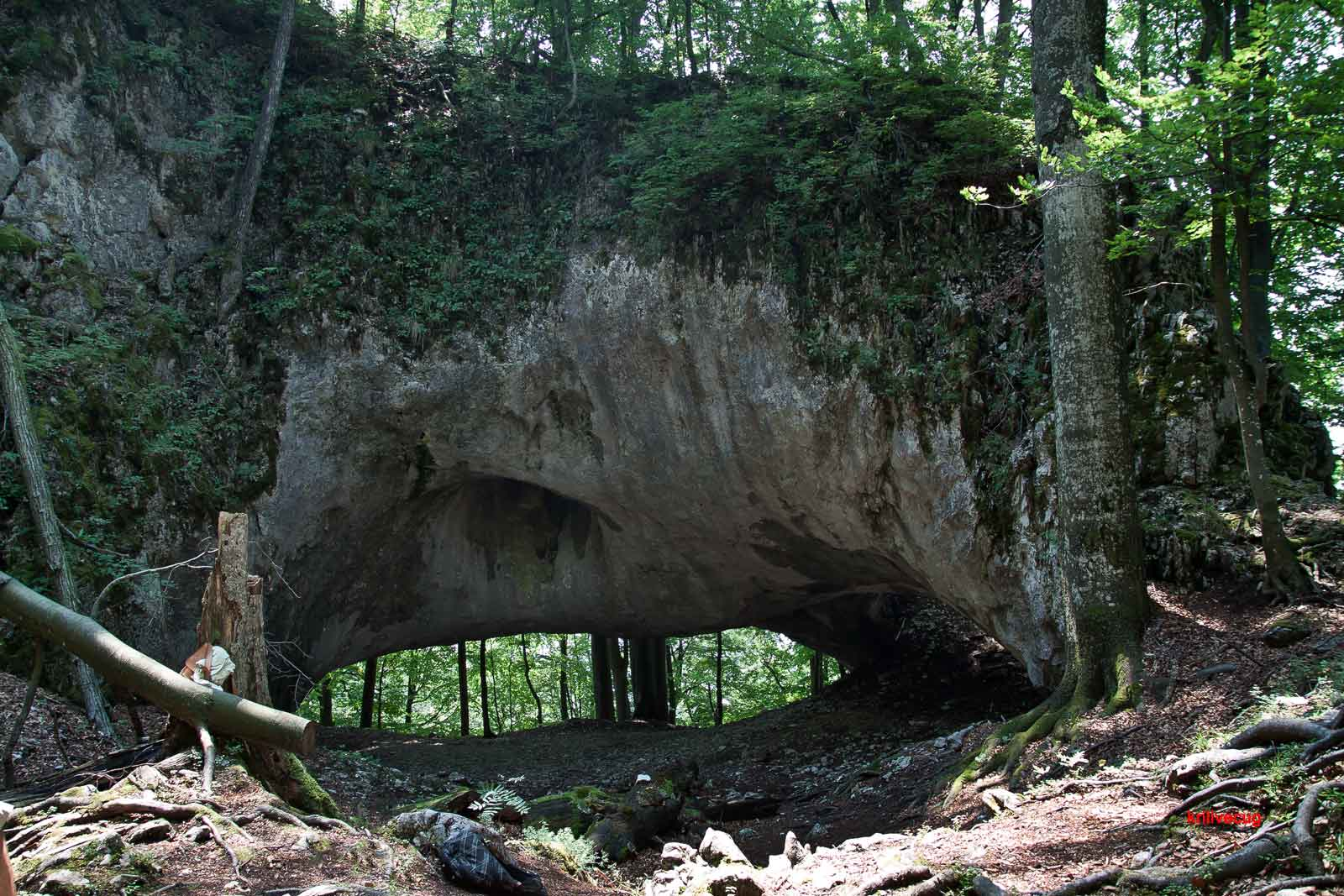 Карстовий міст. Мала уголька. Тячівського району